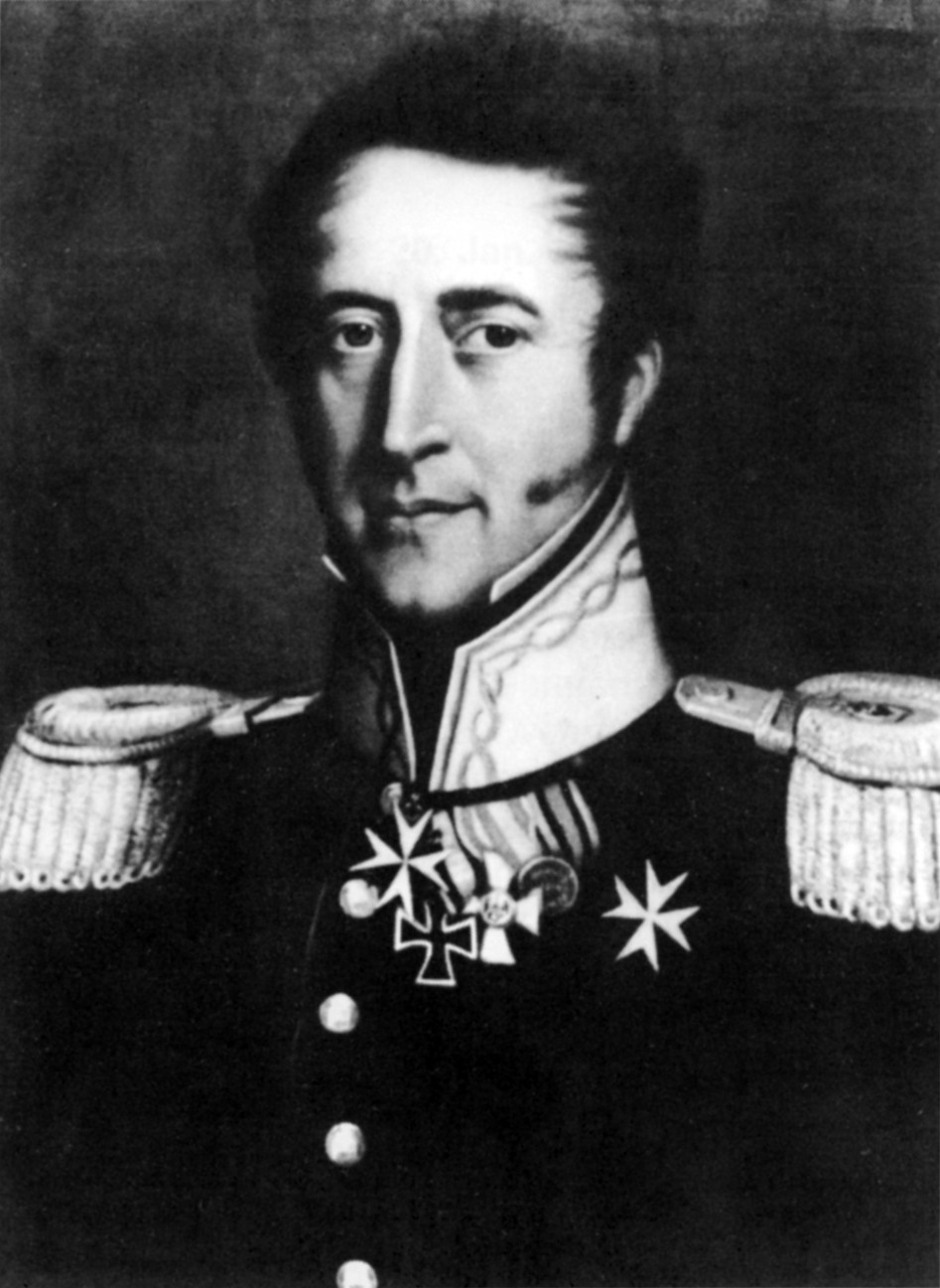 Karl Freiherr von der Horst (17.12.1780-16.2.1861).